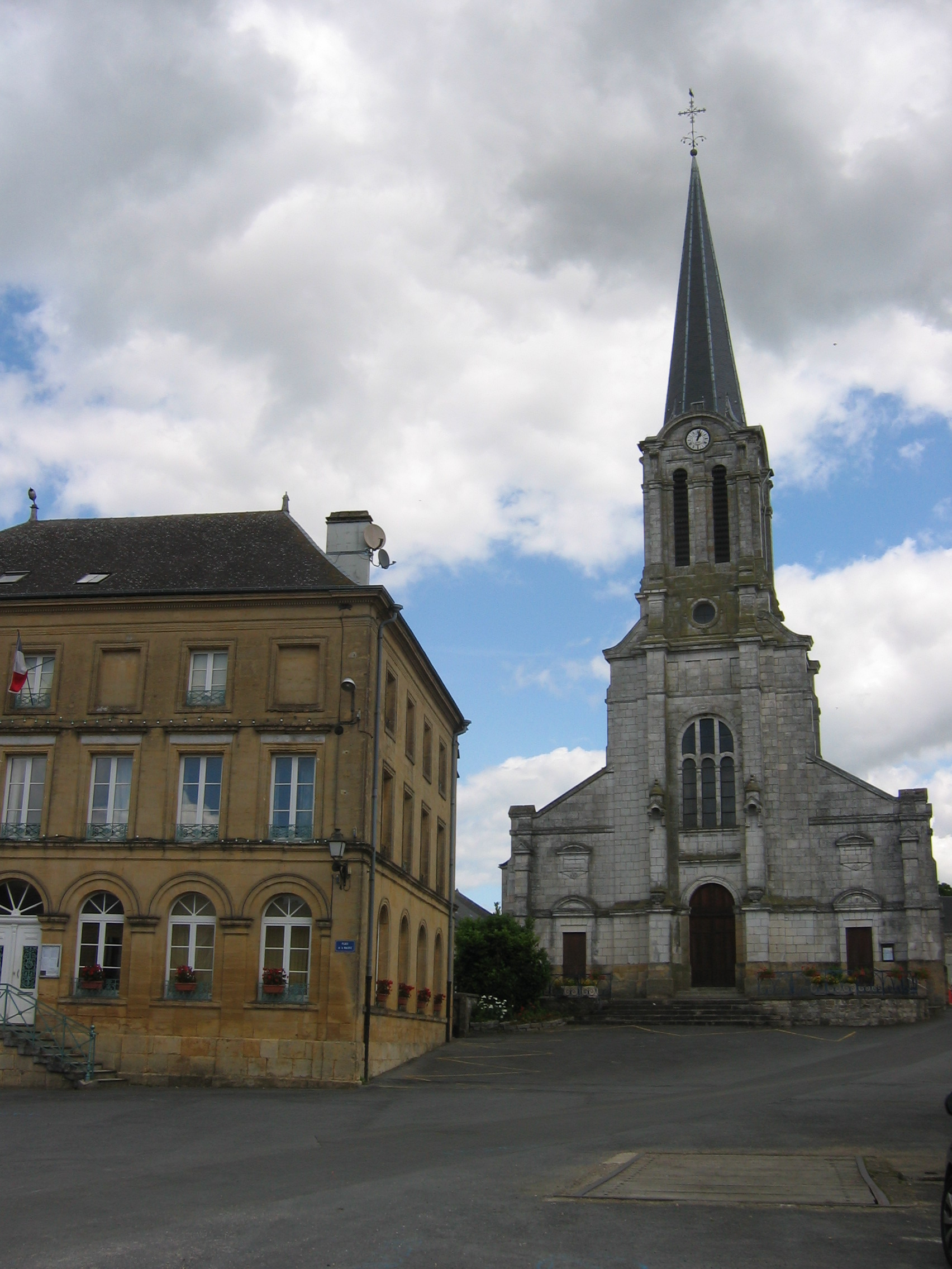 Place prioncipale Thin-le-Moutier Ardennes France